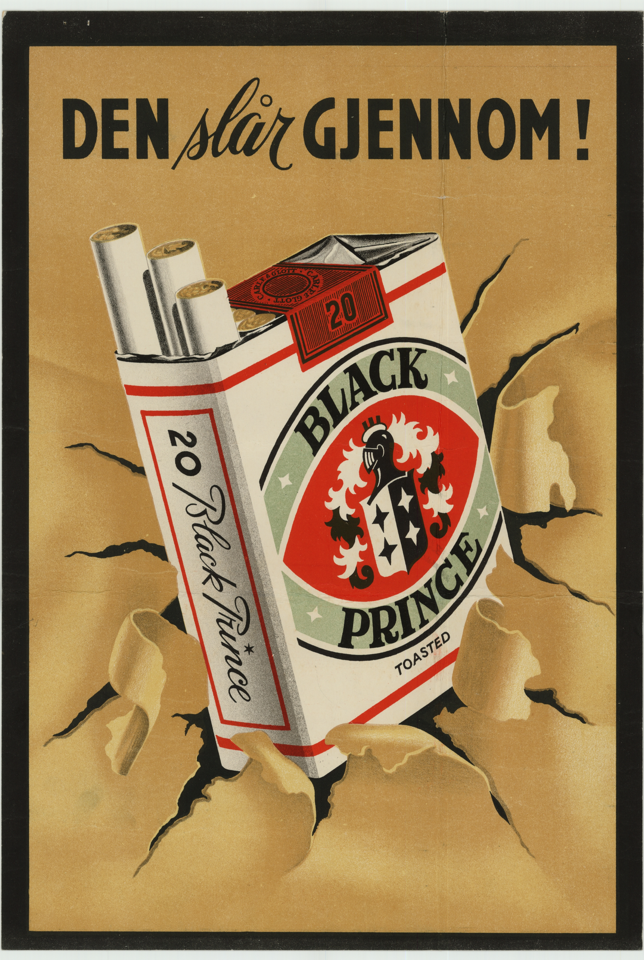 Format: Dokument Dato / Date: 19 April 1949 Kunstner / Artist: Ukjent Wikipedia: M. Glotts Tobakkfabrikk Wikipedia: Plakat Eier / Owner Institution: Trondheim byarkiv, The Municipal Archives of Trondheim Arkivreferanse / Archive reference: Byggesaksarkivet: Olav Tryggvasons gate 34 Fra byggesak 19 April 1949 hvor Carl F. & Glott Forenede Tobakkfabrikker (Avdelingskontoret i Trondheim, Nygaten 28) søker om å få male tobakksreklame som vedlagte plakat på følgende leide gavler: - V. Gavriloff, Nedre Bakklandet 72, gavl mot vest. - Math. Larsen, Olav Tryggvasons gate 34, gavl mot øst. - Iver Myhren, Innherredsveien 58, gavl mot vest. Bygningsrådet godkjente søknaden 20 april 1949 under forutsetning av at reklamene ble holdt godt ved like.